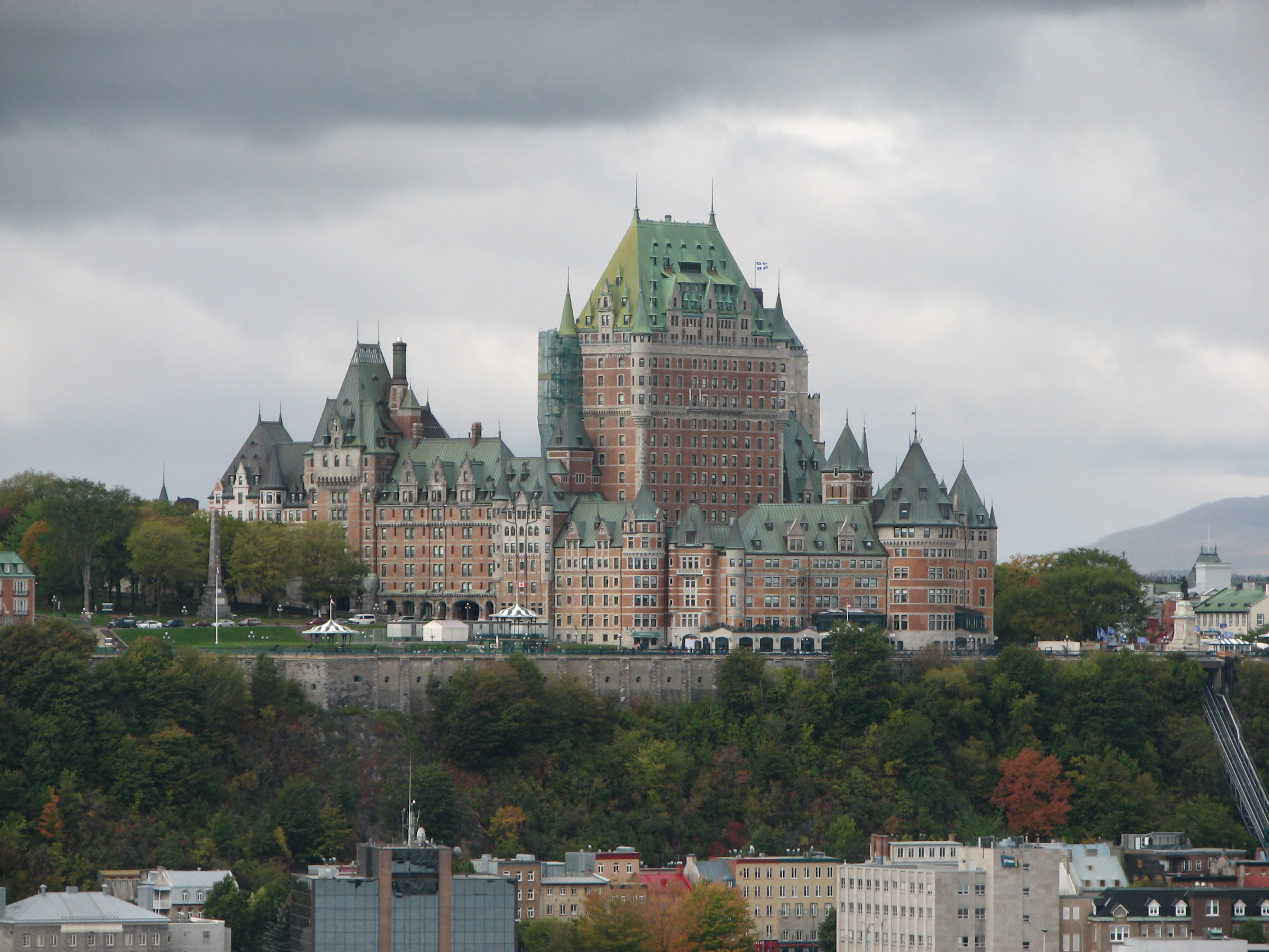 Chateau Frontenac